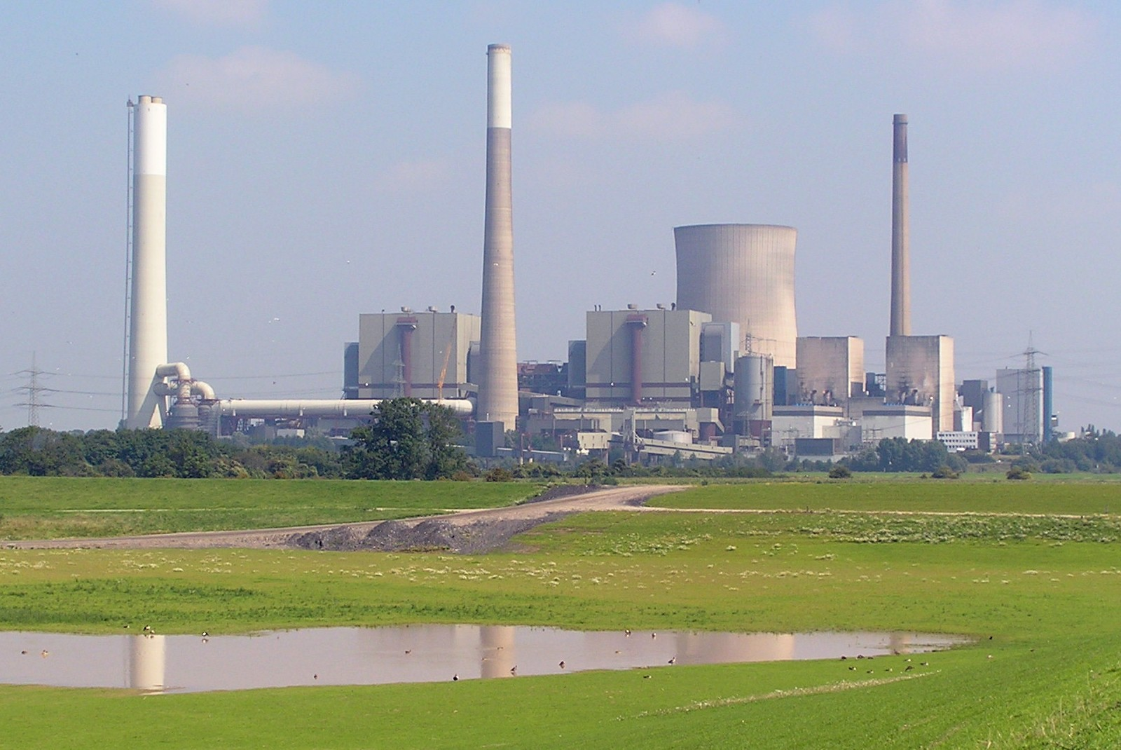 STEAG power plant Voerde, seen from Rheinberg